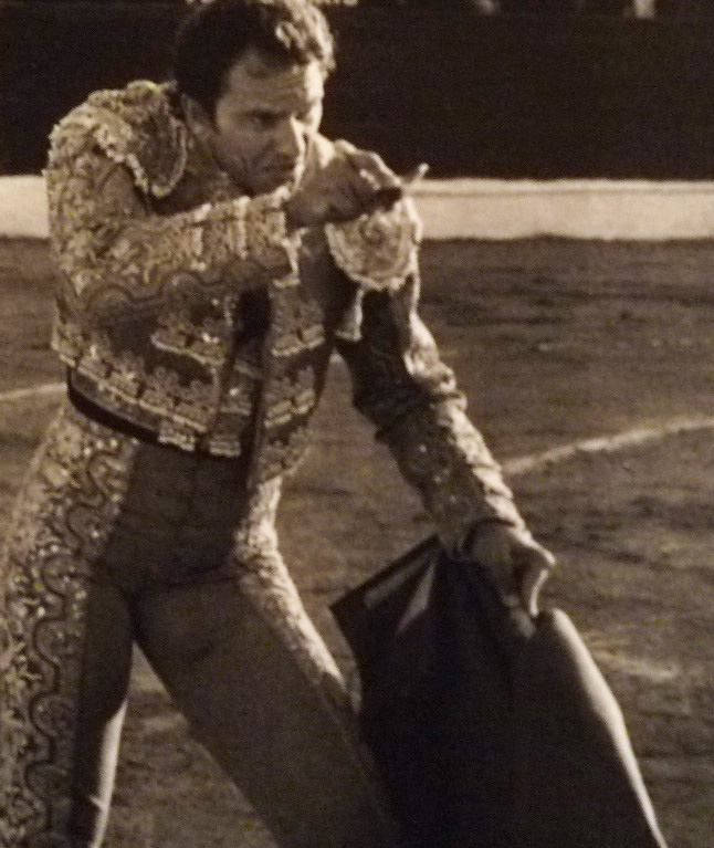 Julito_Aparicio1997